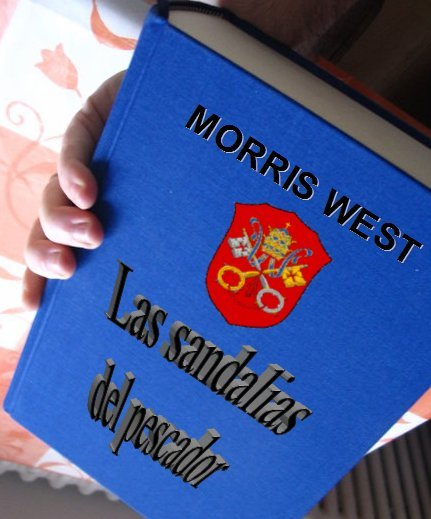 Las sandalias del pescador. Book. NOT A REAL EDITION